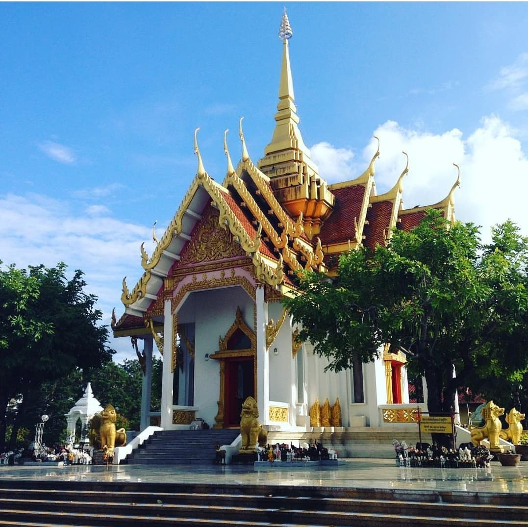 ศาลหลักเมืองอุบลราชธานี